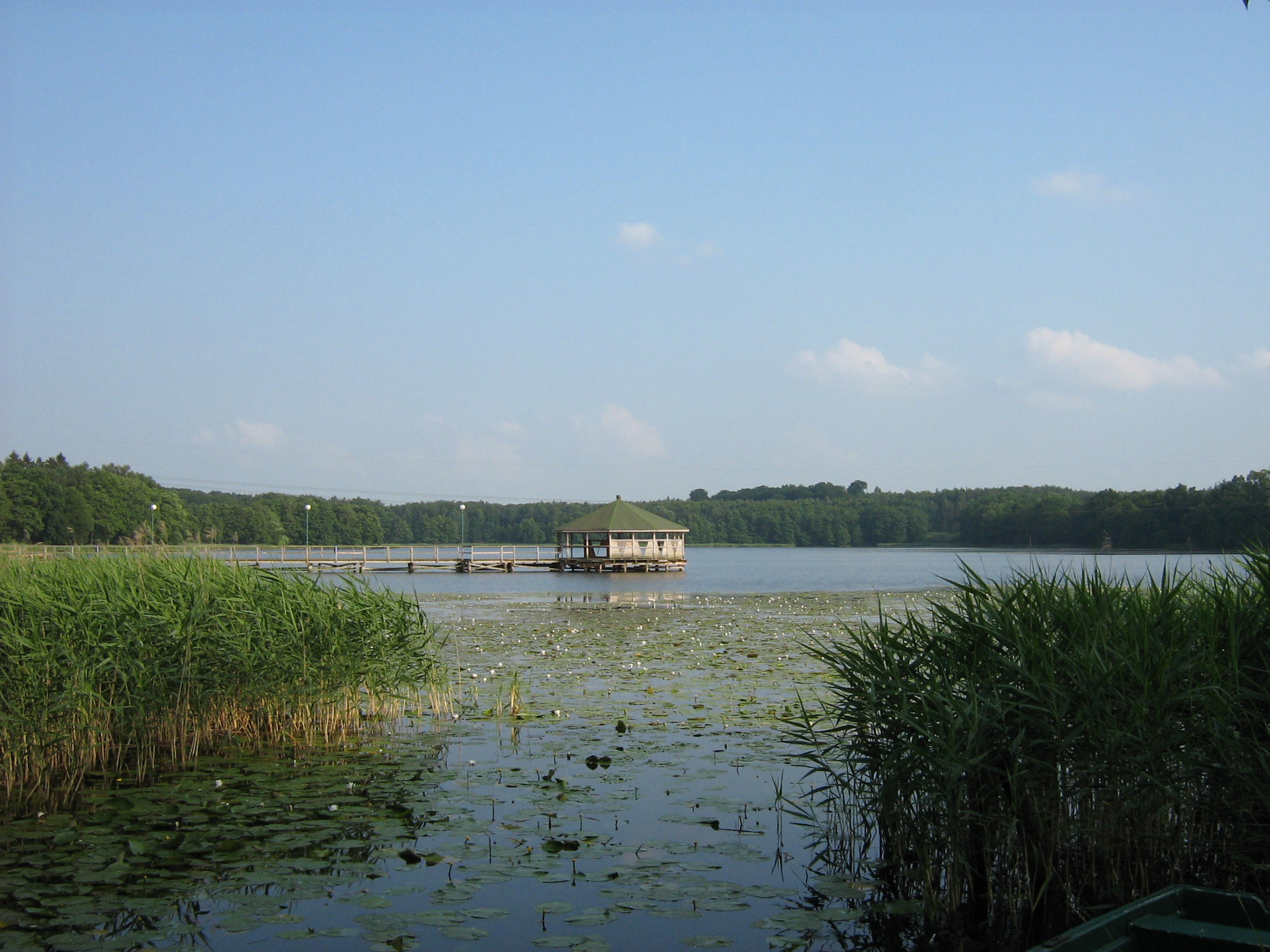 Jezioro Szczucze w Golczewie